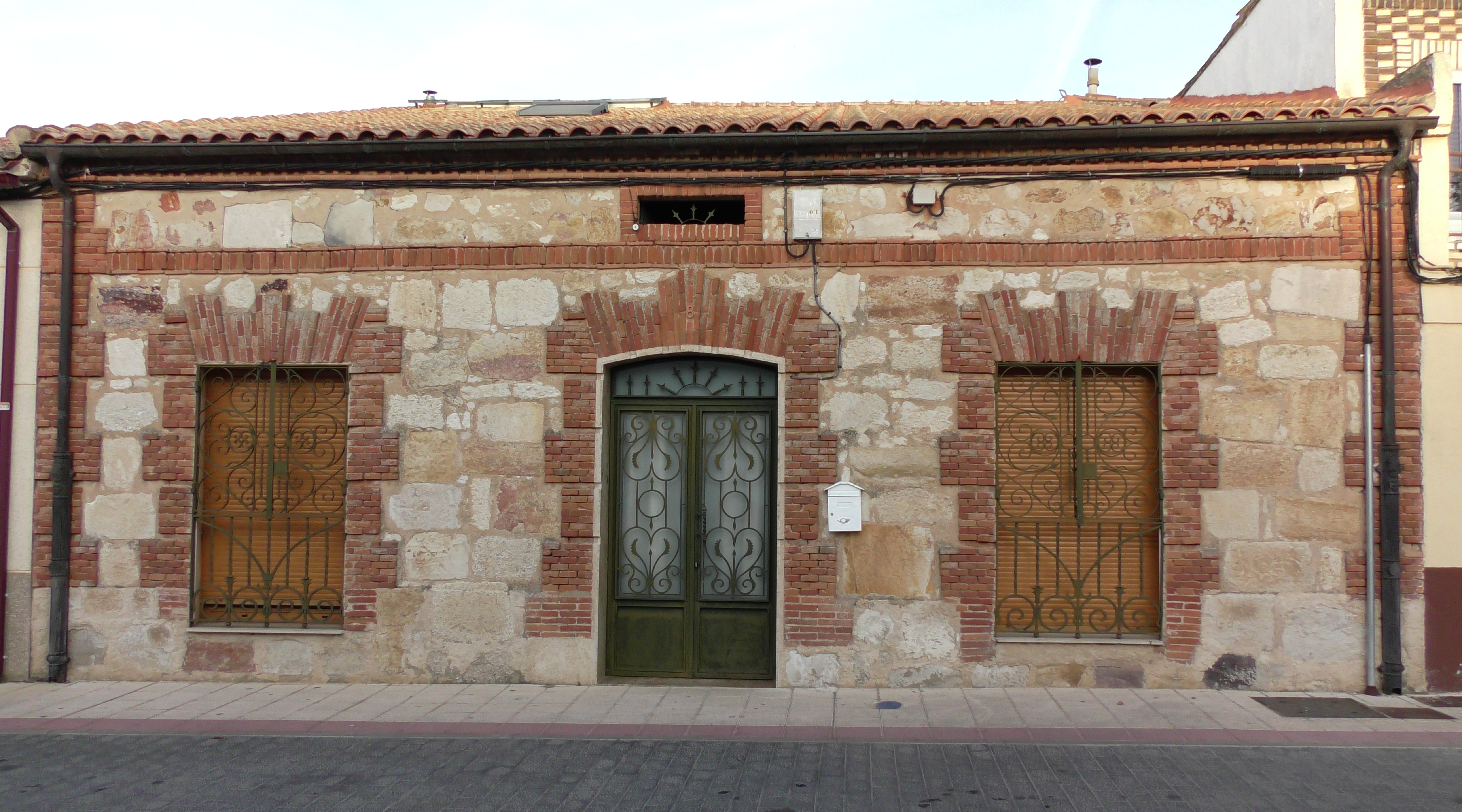 Villaralbo